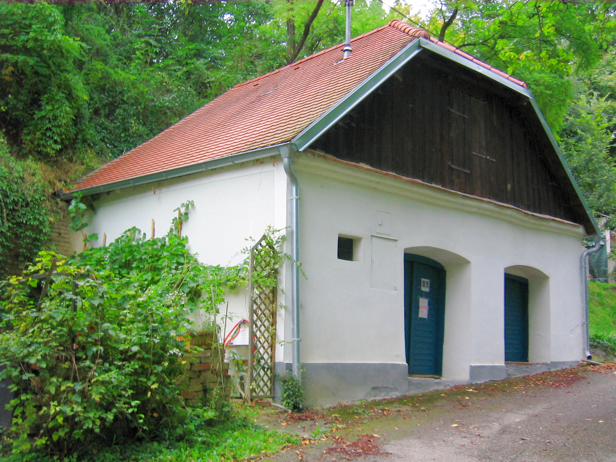 Mühlbergkellergasse Sitzendorf Objekt 6